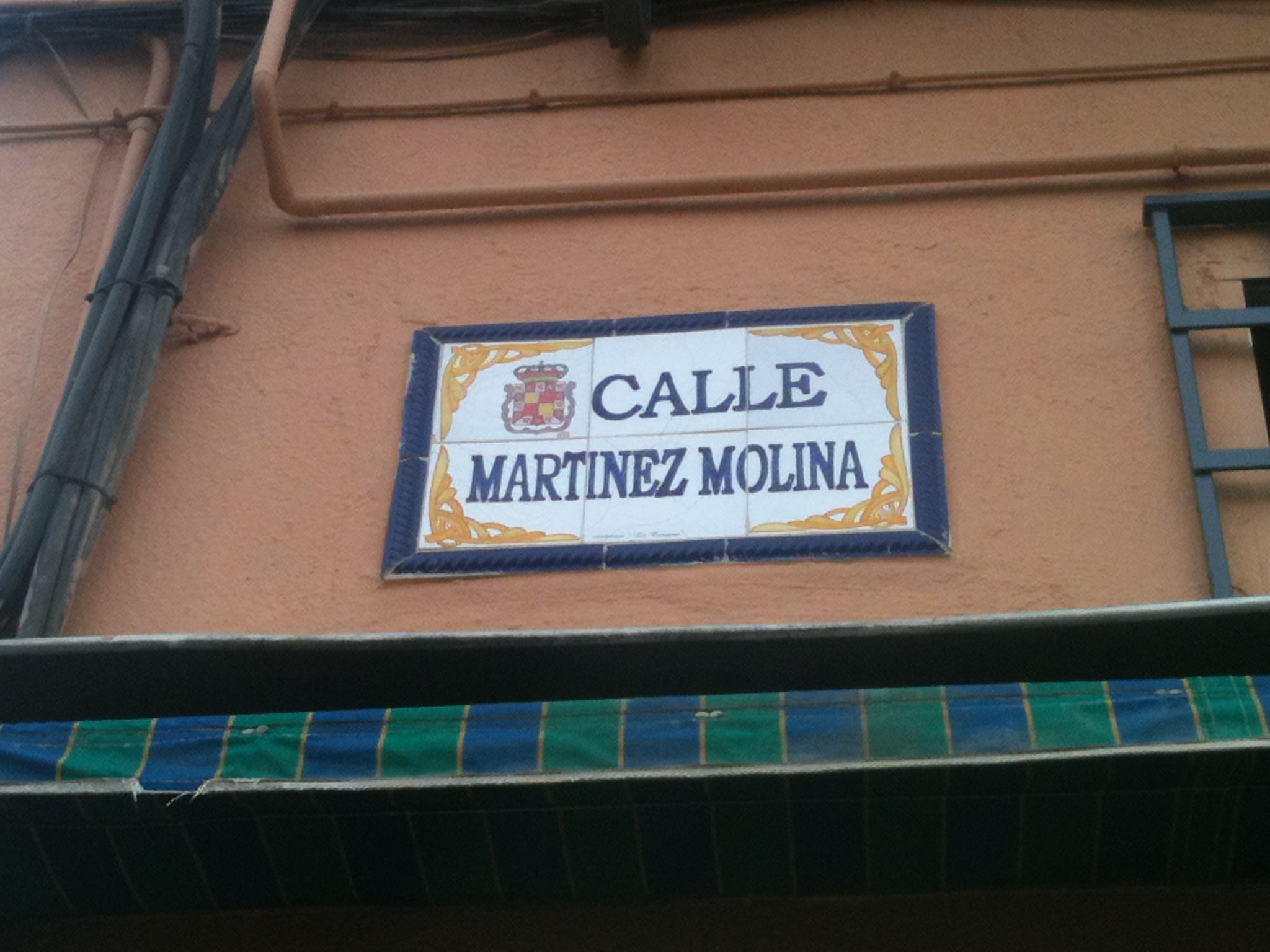 Calle de Rafael Martínez Molina en Jaén (España)